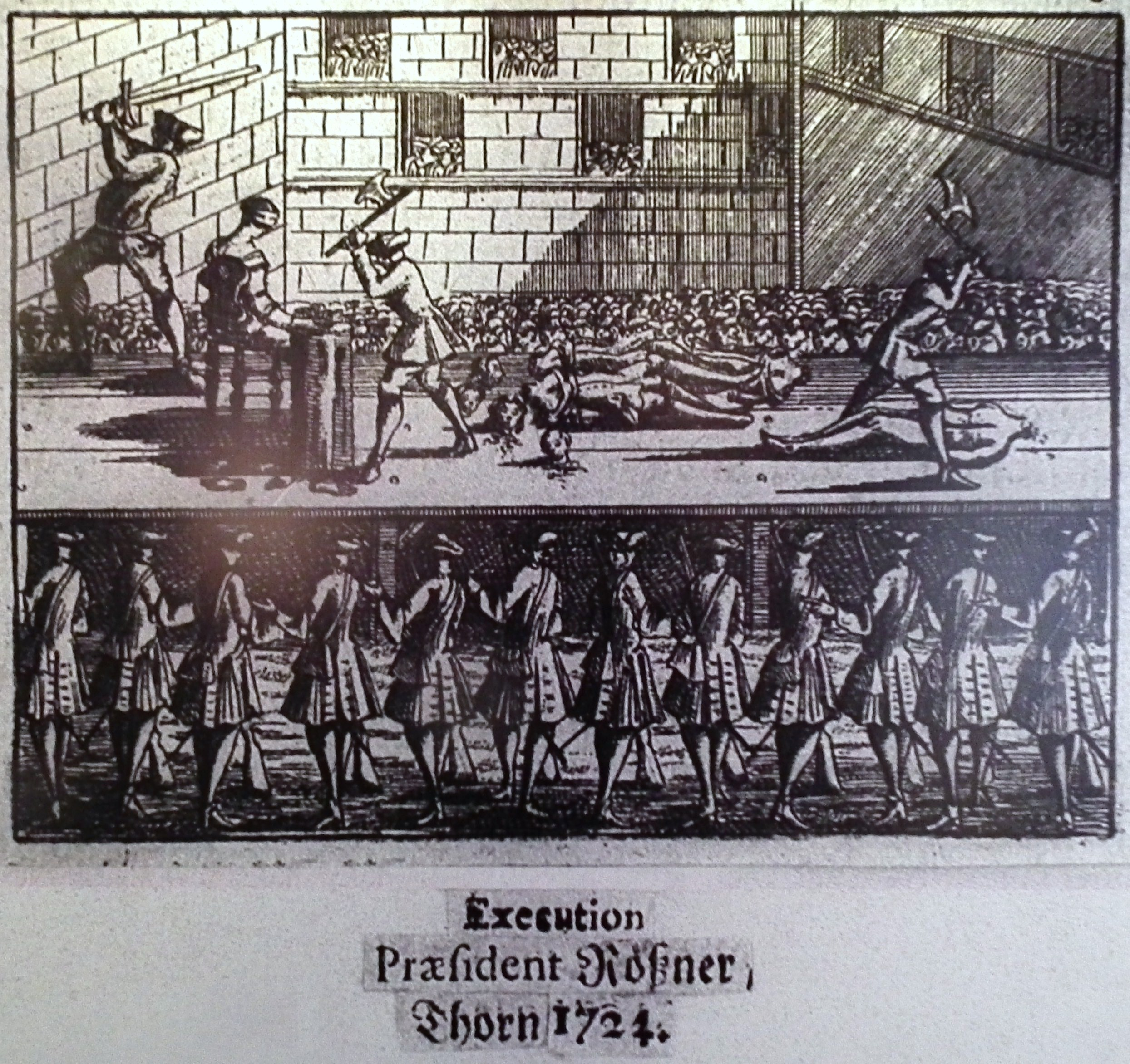 Egzekucja prezydenta Torunia Jana Godfryda Roesnera w 1724r.